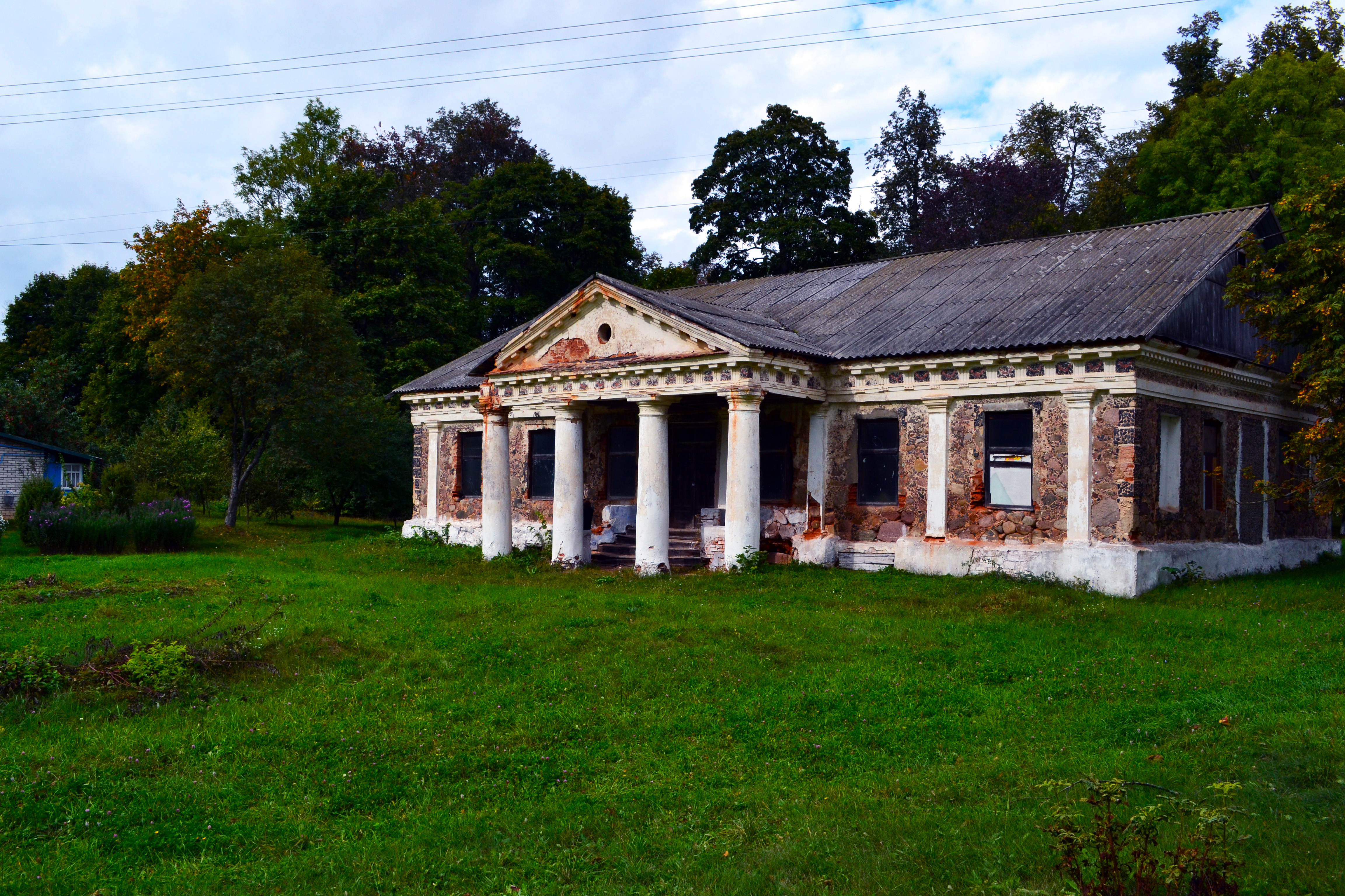 Беларуская (тарашкевіца): Сядзіба Завішаў «Кухцічы» (мяст. Першамайск, Узьдзенскі раён) This is a photo of Belarusian heritage monument. Reference number: 612Г000628 ( WLM)